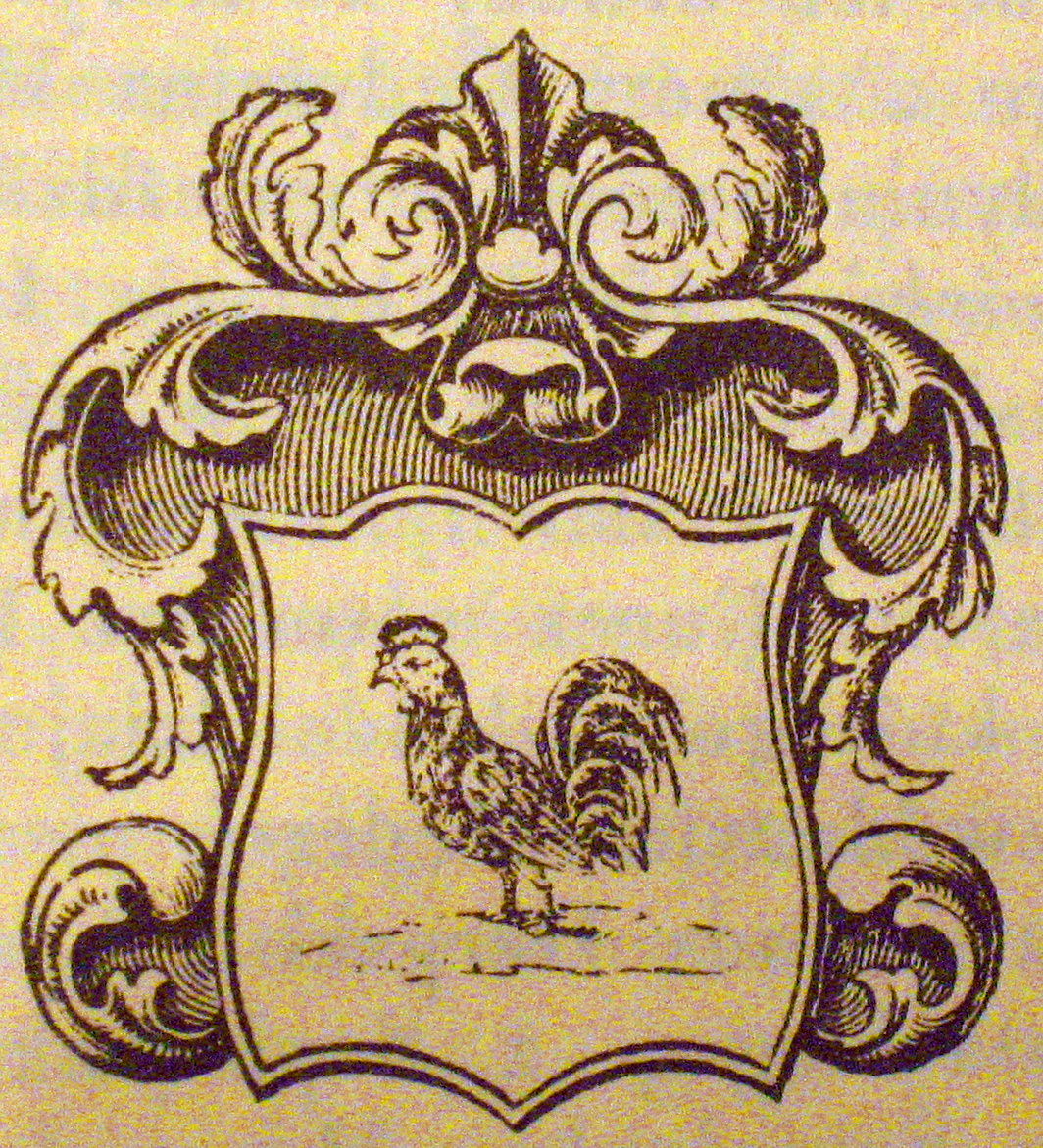 Zdjęcie herbu Kur Biały z "Herbarza Poski" Kaspra Niesieckiego